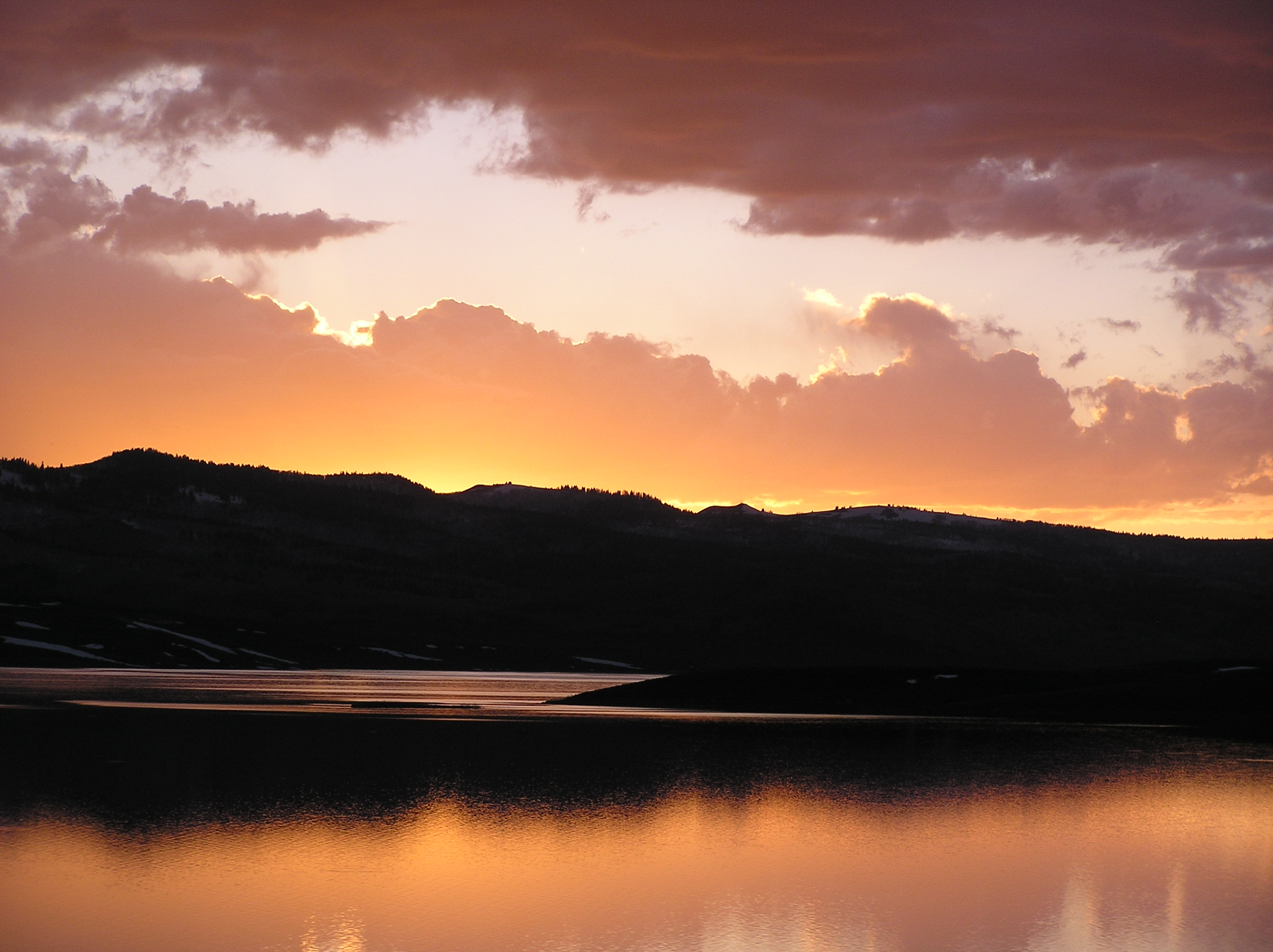 Strawberry Reservoir sunset.